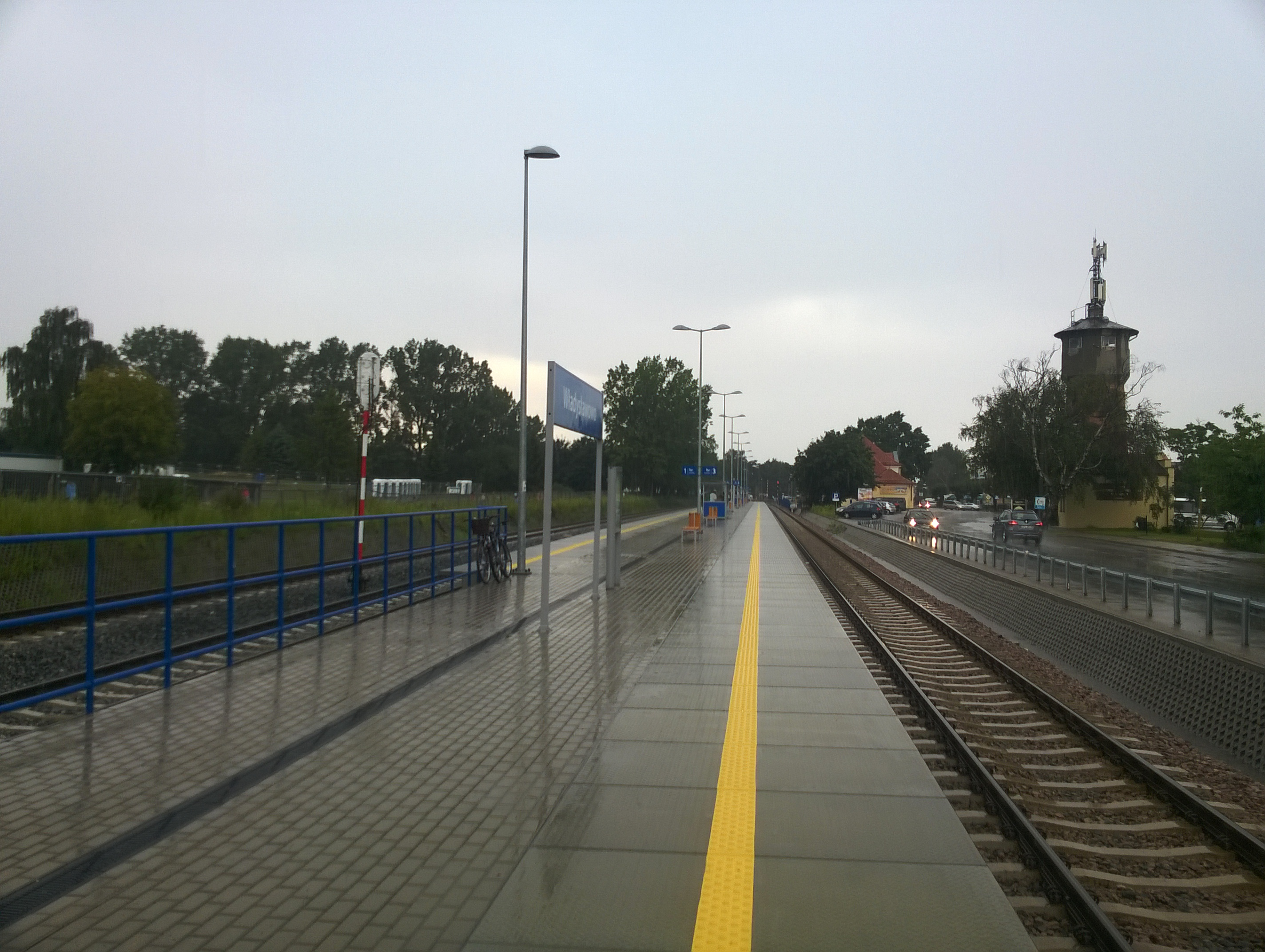 Peron stacji kolejowej we Władysławowie